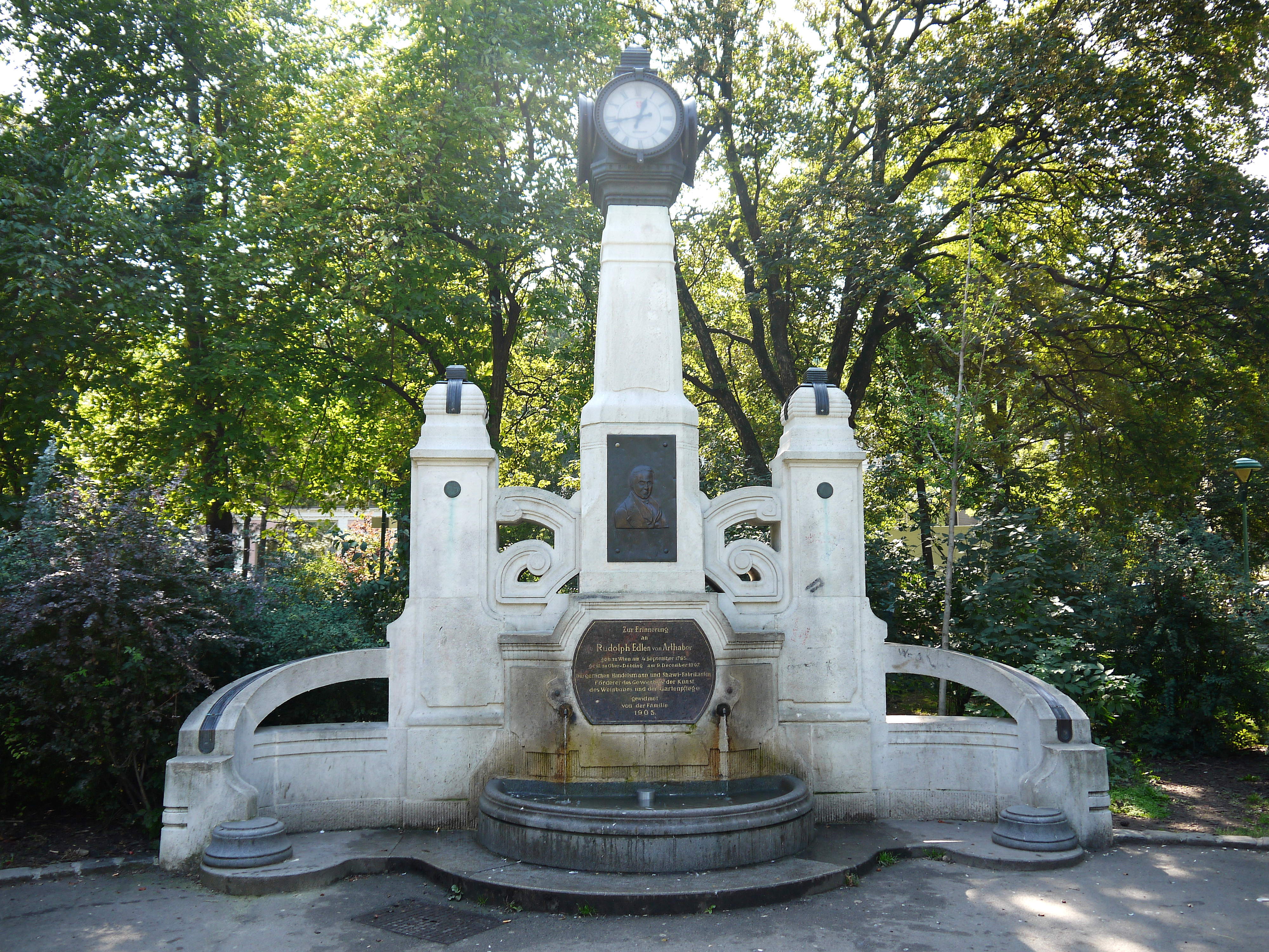 Arthaber-Denkmal im Park